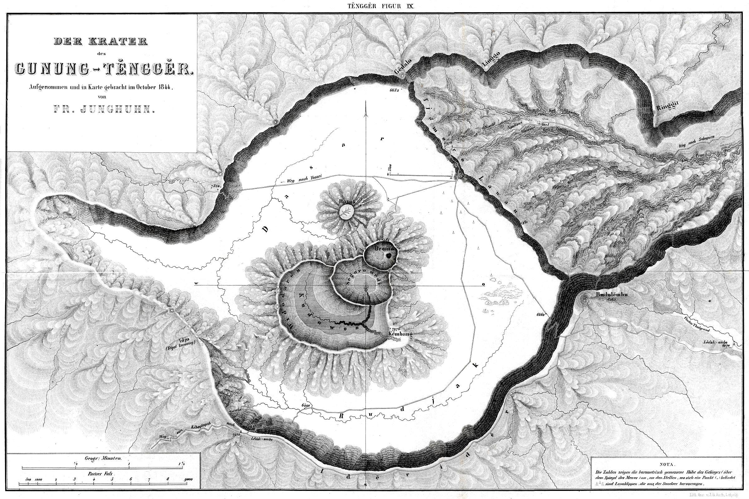 Tengger-Gebirge. Aufgenommen von Franz Wilhelm Junghuhn 1844